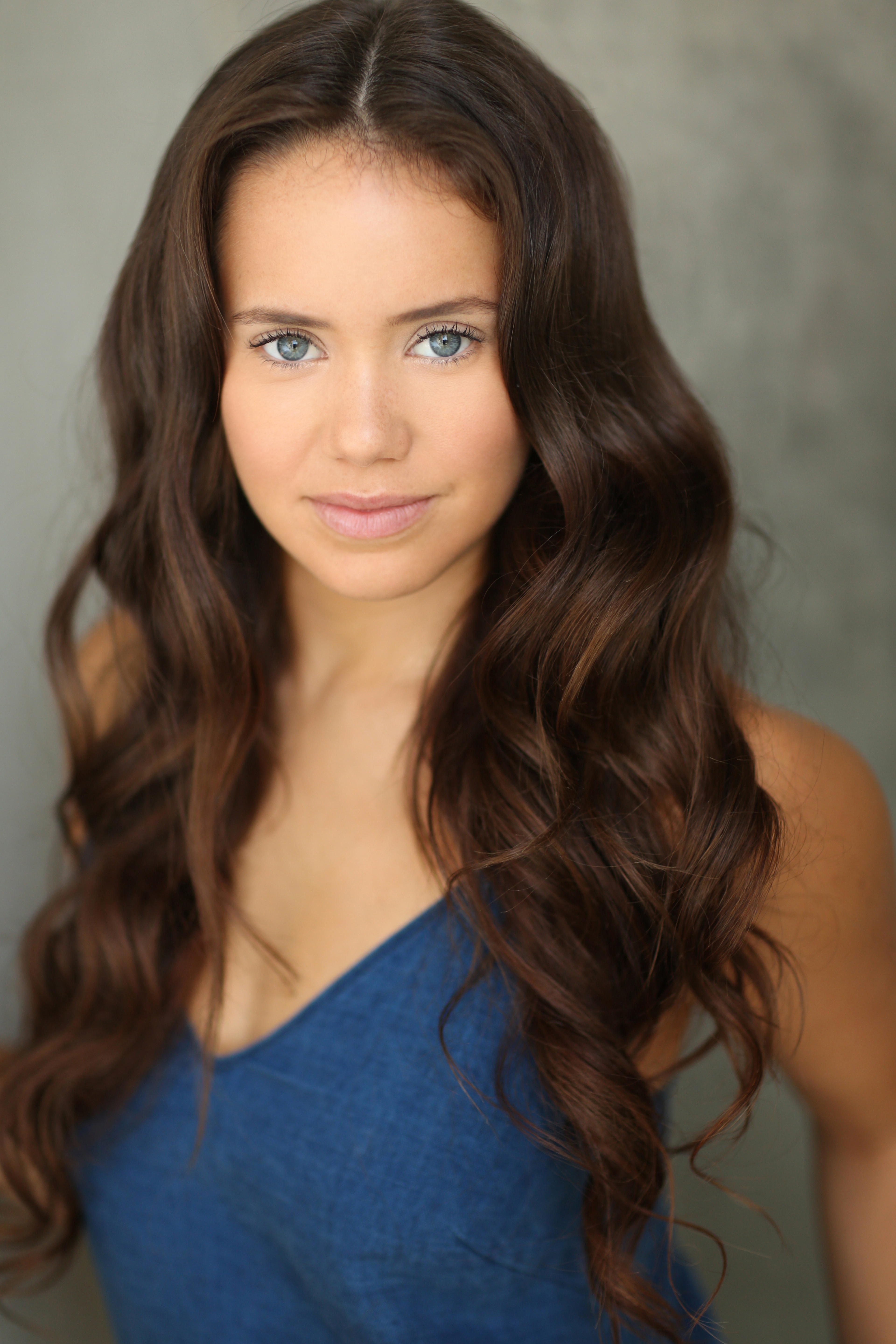 Актриса